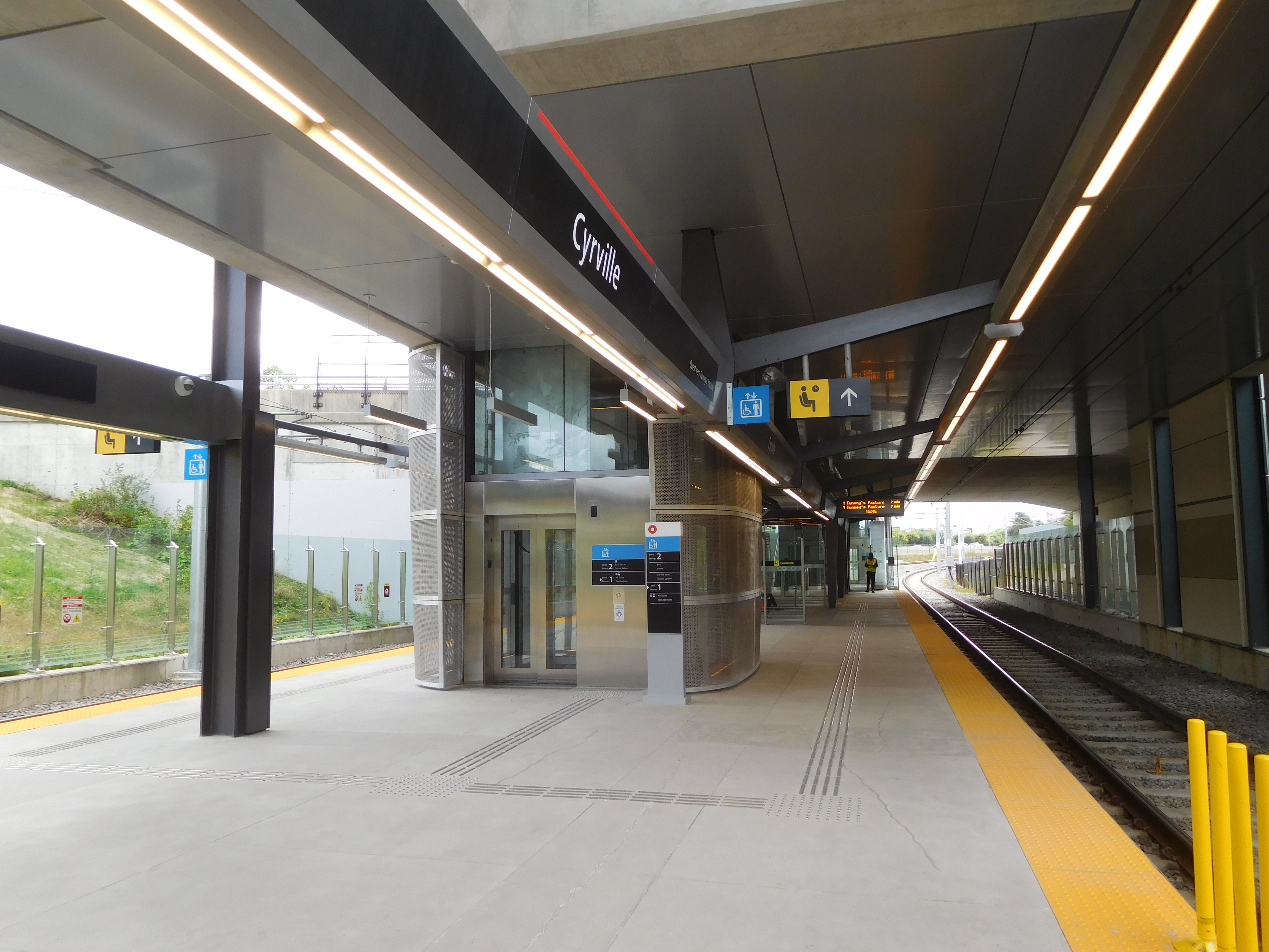 Station Cyrville de la ligne de la Confédération à Ottawa